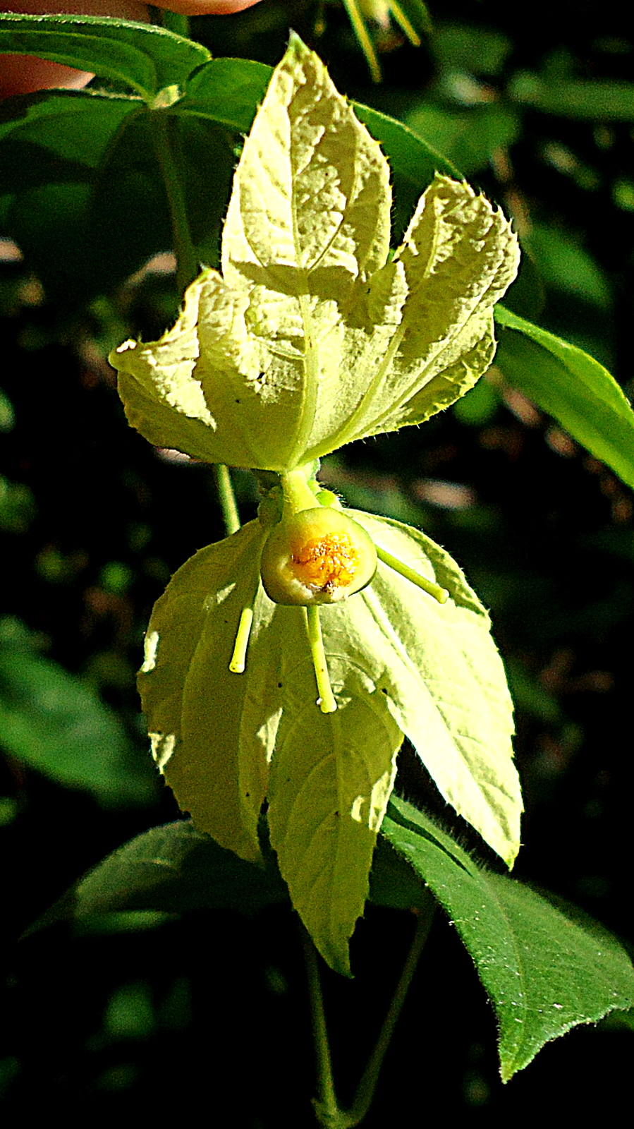 Dalechampia peckoltiana Müll.Arg.